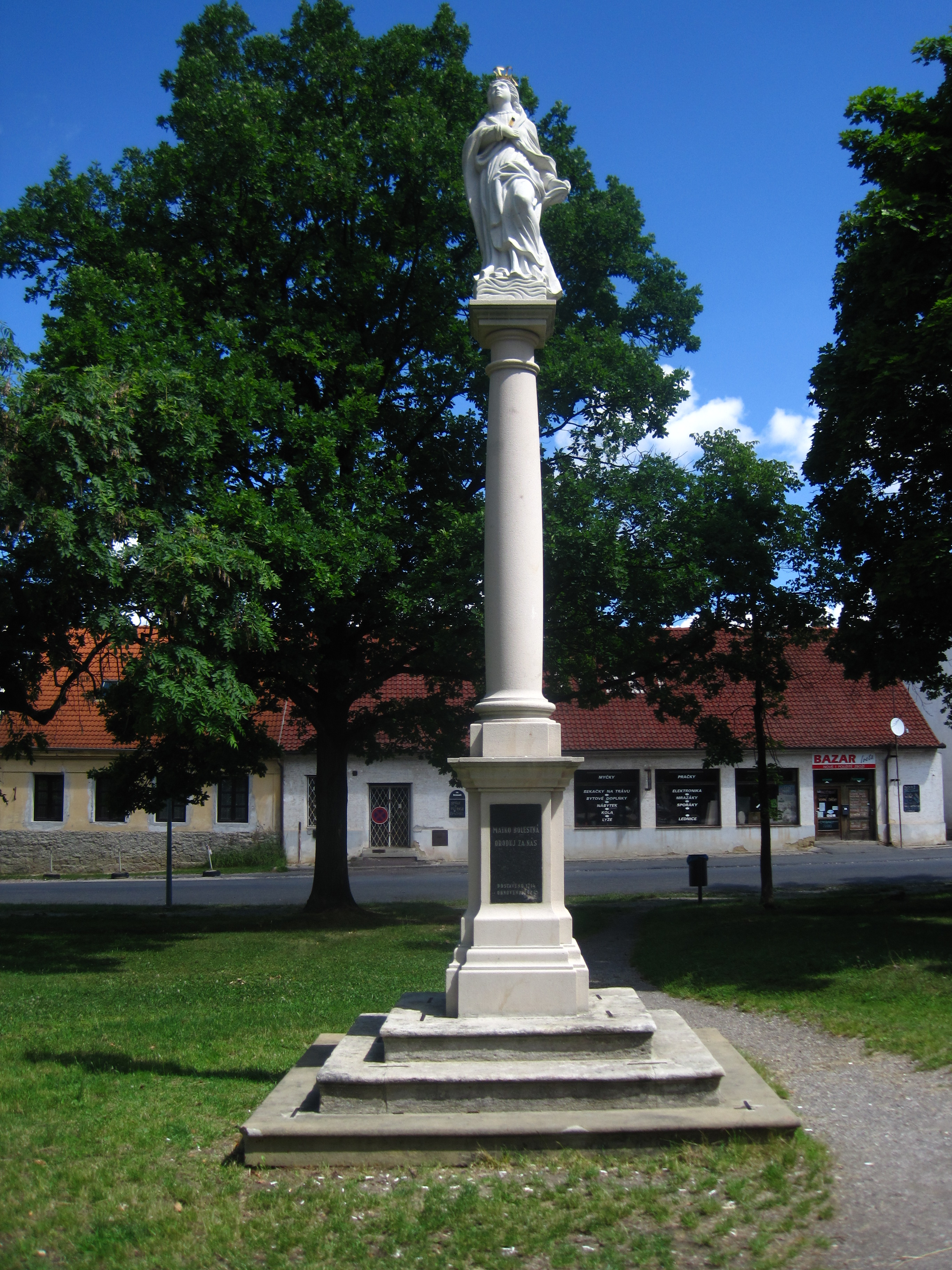 Sloup se sochou Panny Marie, Tyršovo náměstí, v parku, Hostomice (okres Beroun).